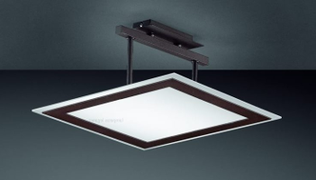 Lámpara de techo actual: Semiplafón led